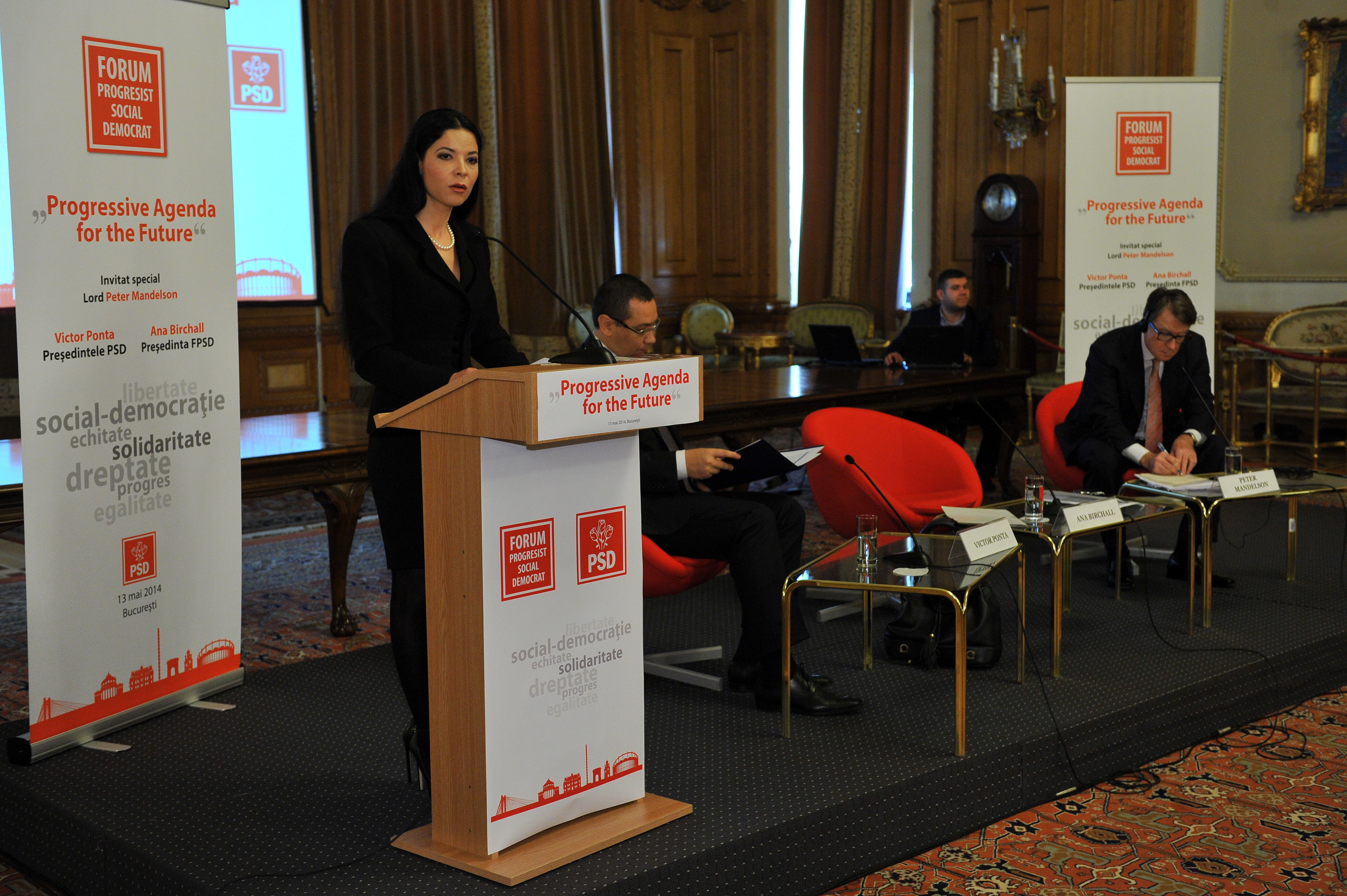 Forumul progresist social-democrat, Parlament - 13.05 (2)